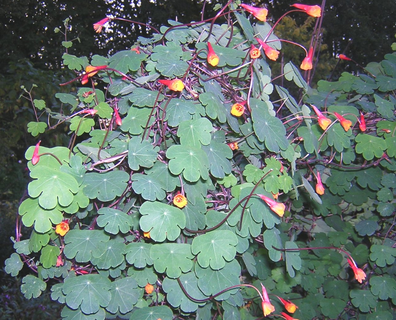 Tropaeolum tuberosum, capucine tubereuse (Jardin du Thabor à Rennes en France)